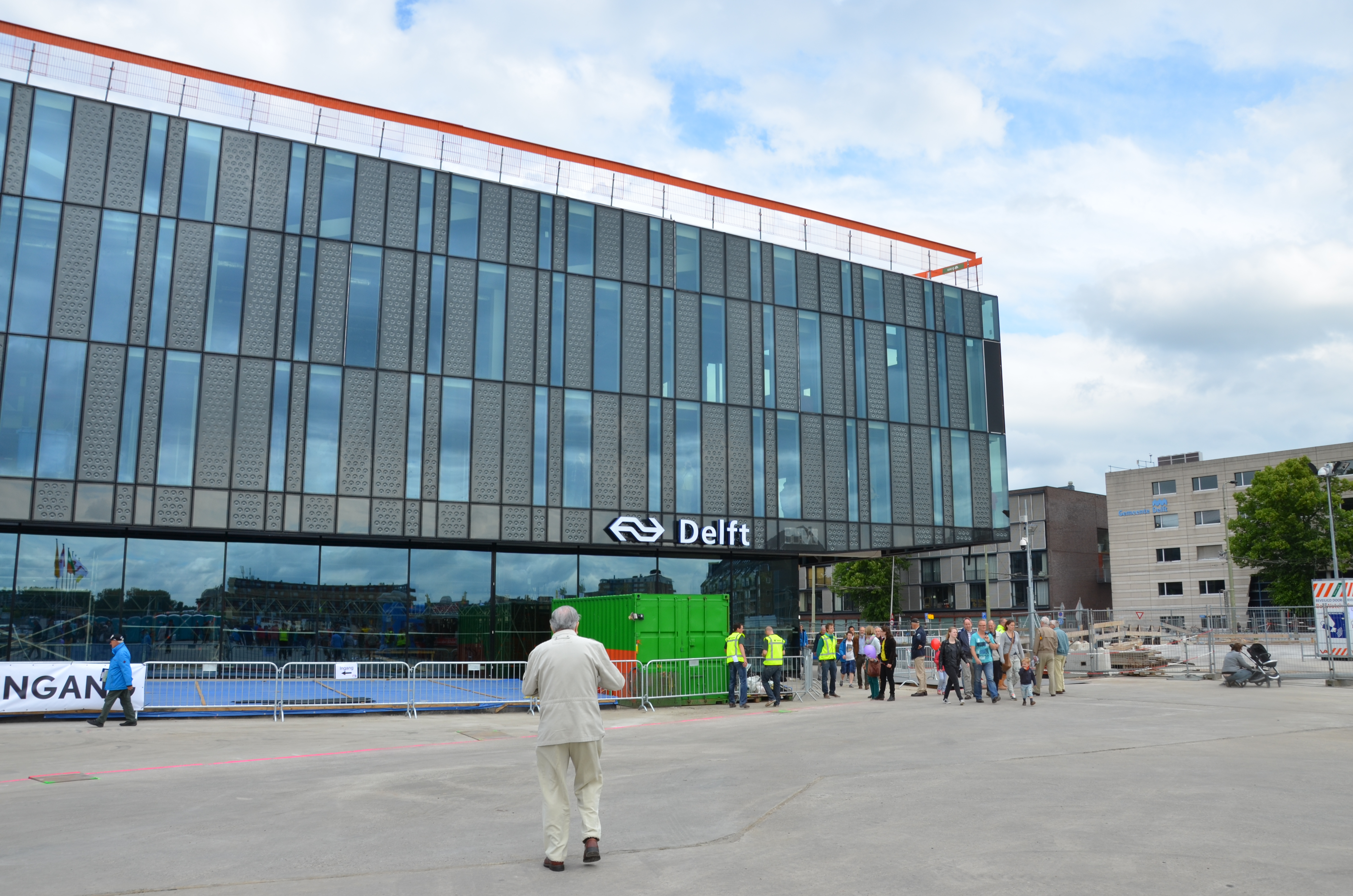 Het nieuwe stationsgebouw in Delft.